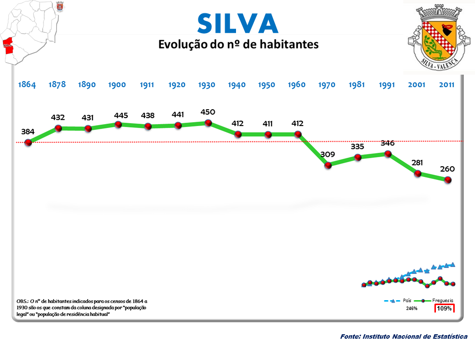 Censos 1864/2011